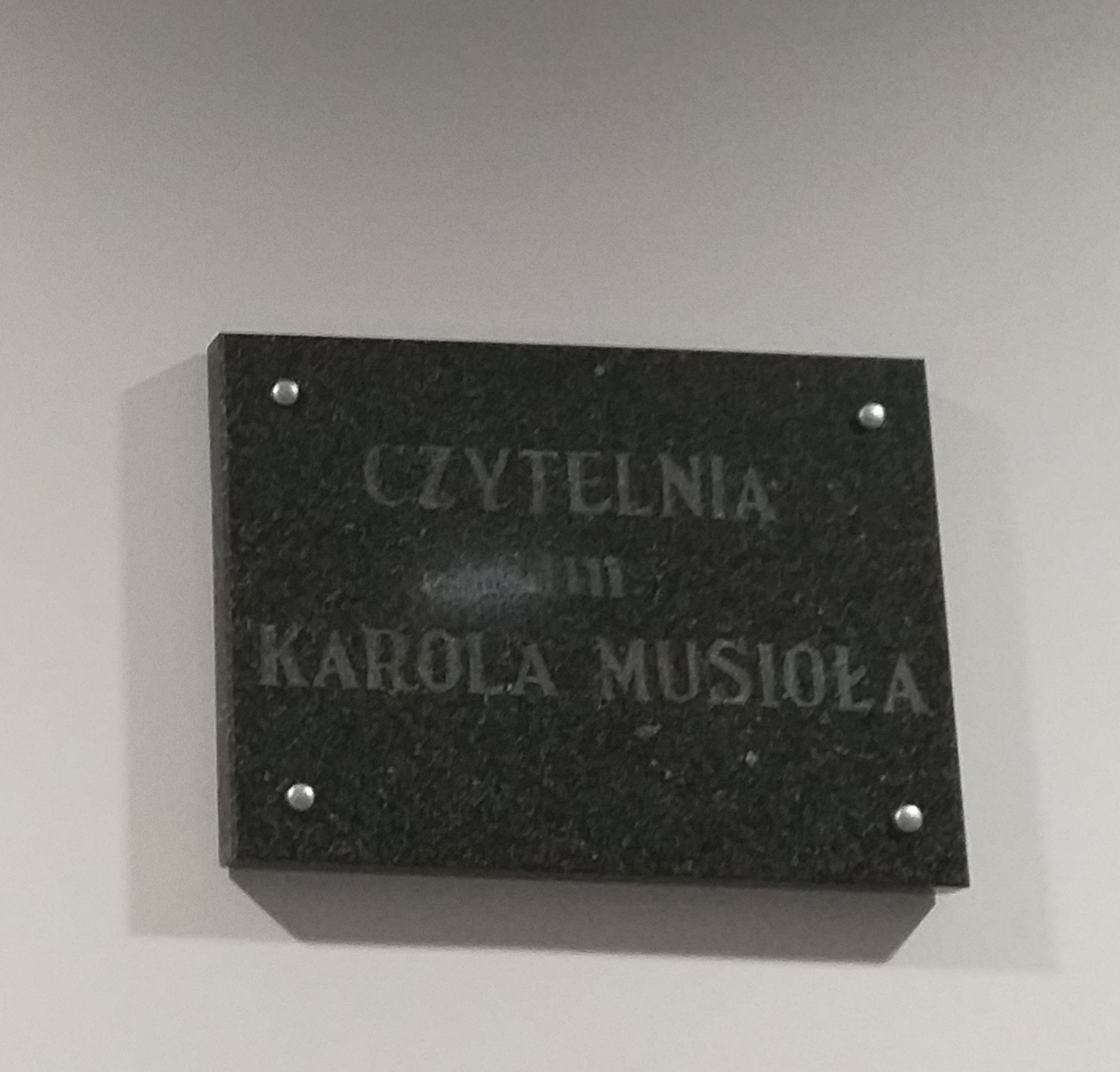 Czytelnia im. Karola Musioła w Akademii Muzycznej w Katowicach - płyta pamiątkowa